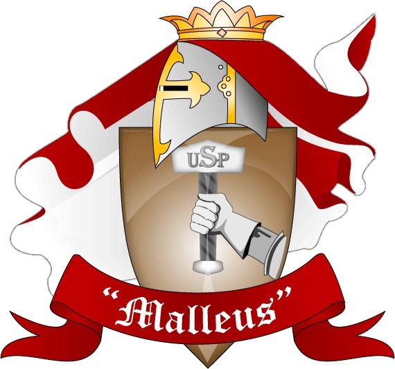 Grb studentske udruge Maleus (veća rezolucija; high resolution)